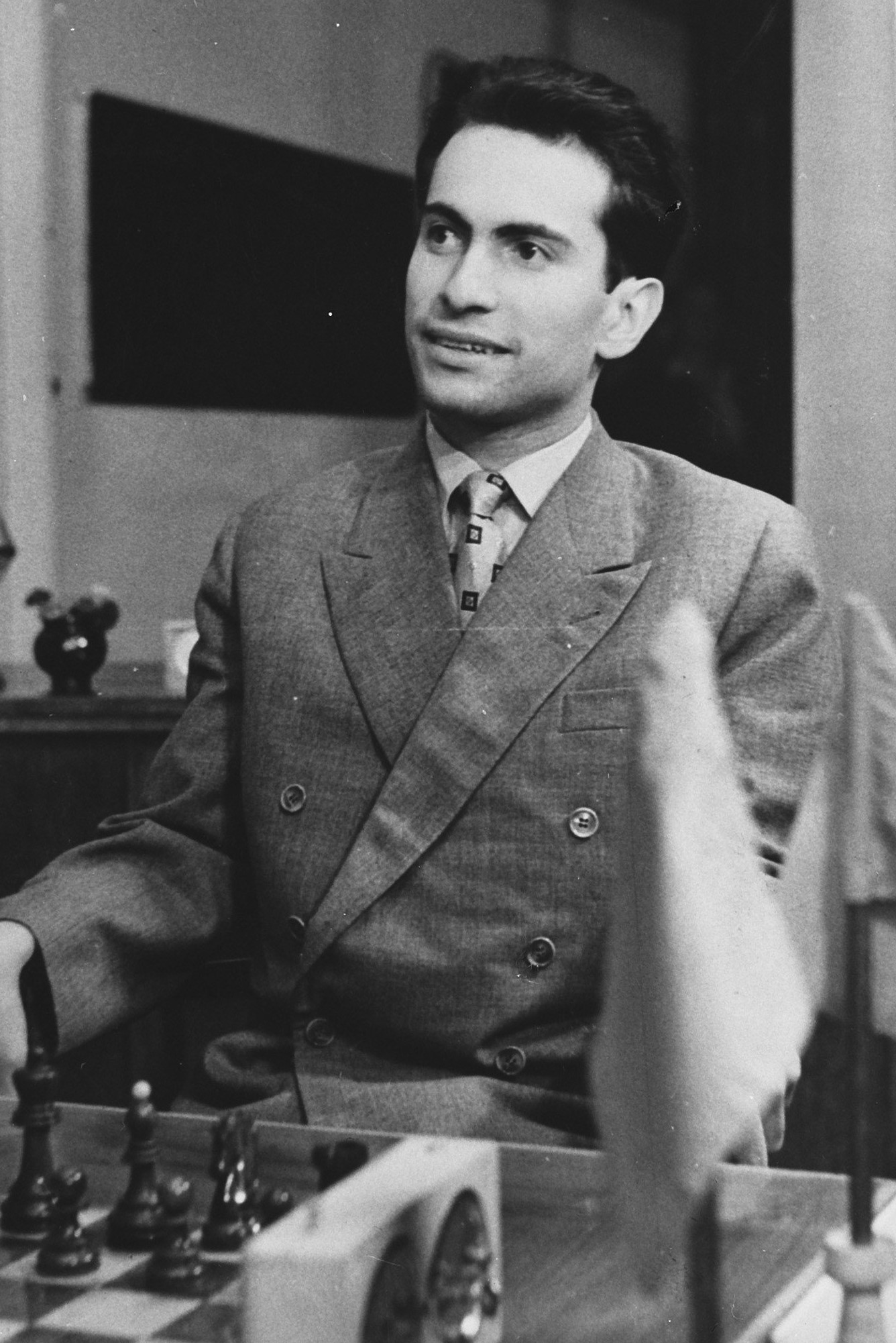 Collectie / Archief : Fotocollectie Anefo Reportage / Serie : [ onbekend ] Beschrijving : Wereldkandidaten schaaktoernooi in Zuid Slavia Tal (Rusland), Petrosjan (Rusland) Datum : 2 oktober 1959 Locatie : Rusland, Zuid Slavia Trefwoorden : schaken Persoonsnaam : Petrosian, Tigran Fotograaf : Fotograaf Onbekend / Anefo Auteursrechthebbende : Nationaal Archief Materiaalsoort : Glasnegatief Nummer archiefinventaris : bekijk toegang 2.24.01.09 Bestanddeelnummer : 910-7198